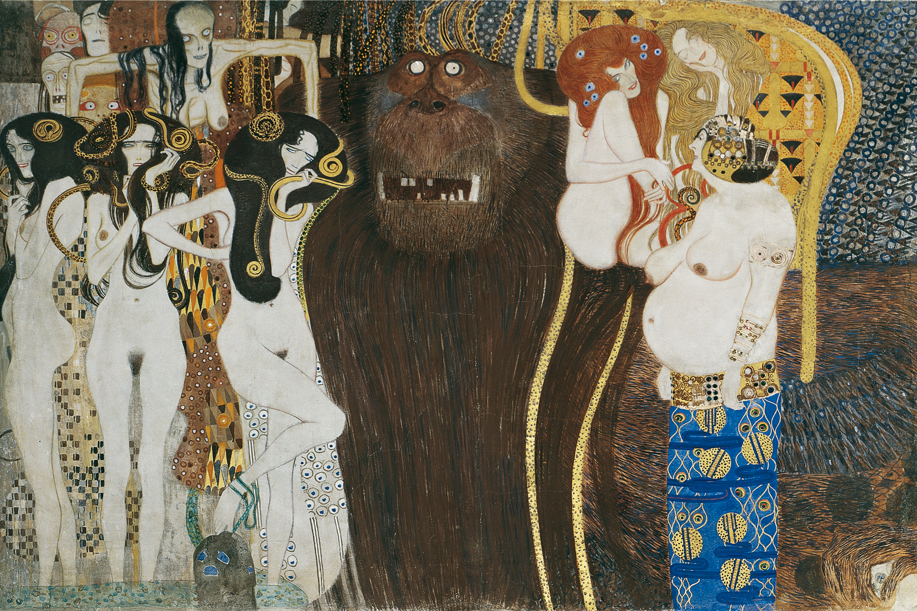 detail: Die feindlichen Gewalten